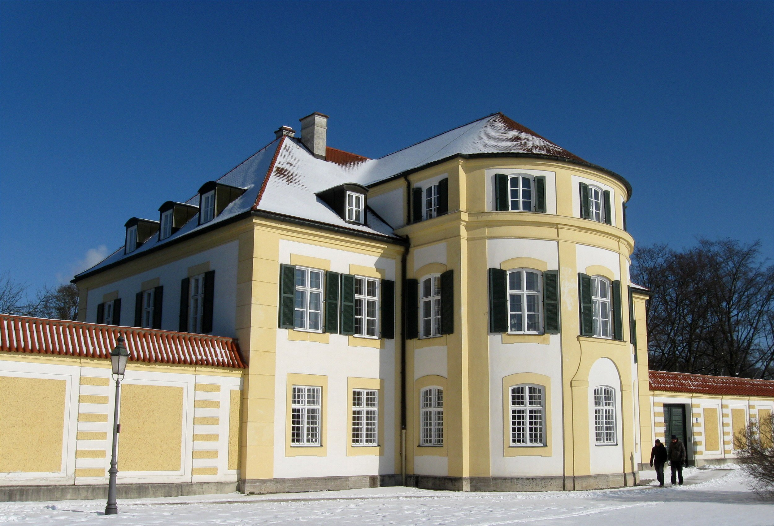 Nördliches Schloßrondell 10; Rondellpavillon, zweigeschossiges Wohnhaus mit Walmdach, halbrundem Mittelrisalit und Putzgliederung, von Joseph Effner, um 1740/50; beidseitig Rondellmauer mit barocker Putzgliederung, bauzeitlich; siehe Schloss Nymphenburg.